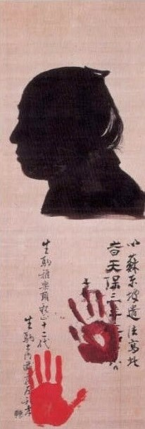 生駒親孝の肖像。